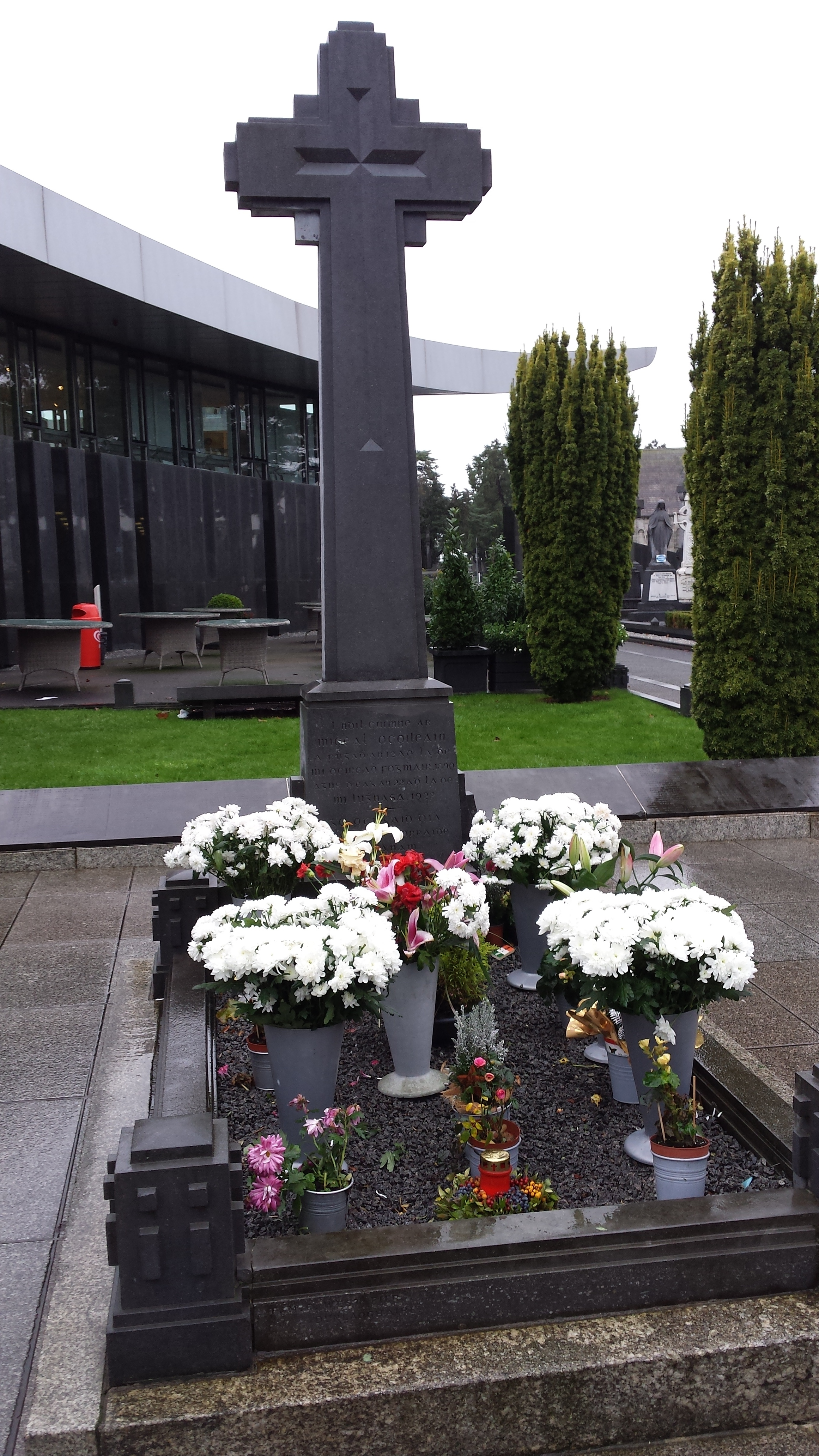 Tomba de Michael Collins